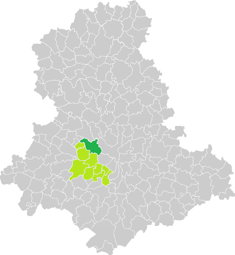 Carte de situation de la commune de Verneuil-sur-Vienne (en vert foncé) dans le votre Canton (en vert clair) sur une carte des communes de la Haute-Vienne